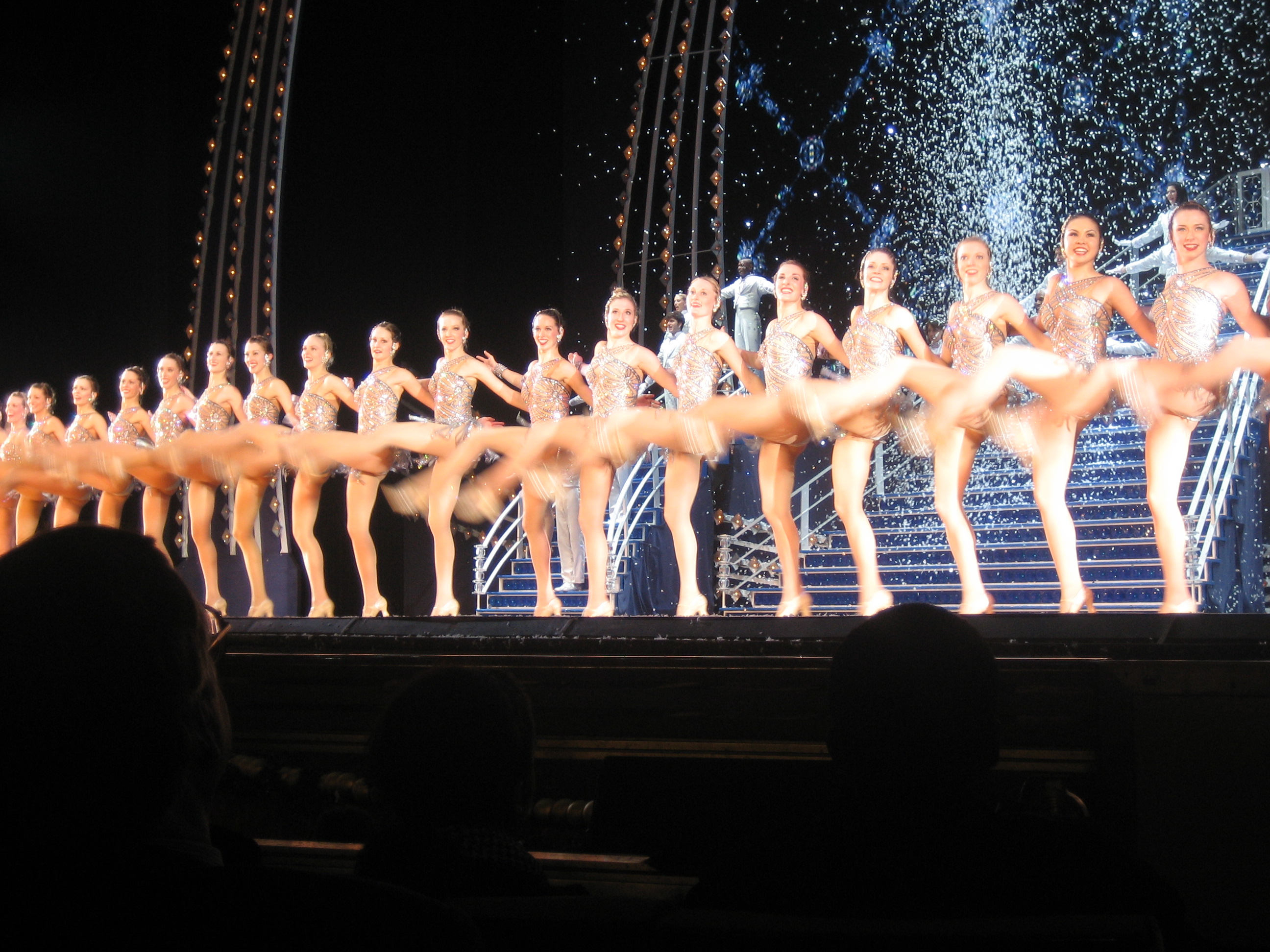 Rockettes